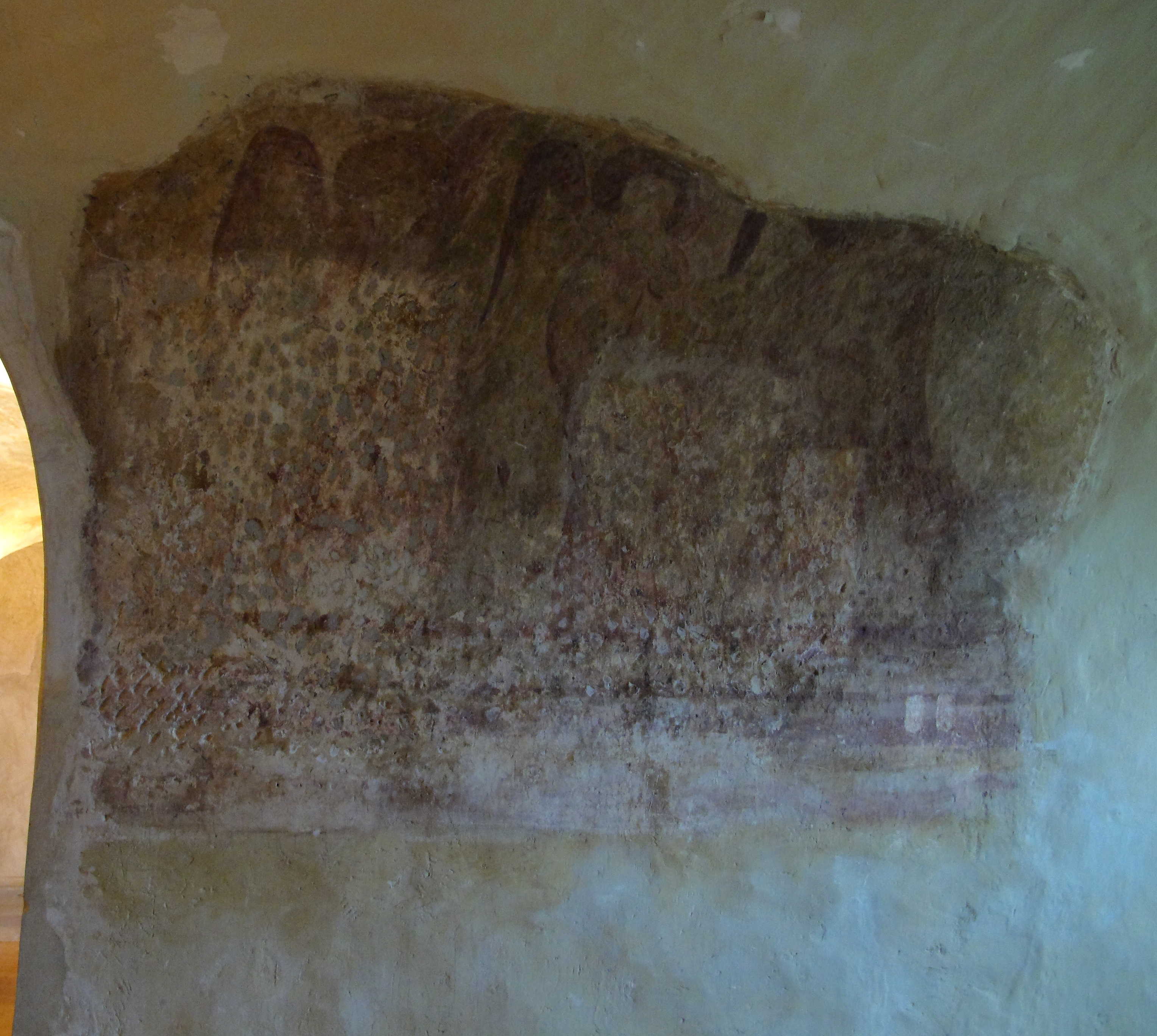 Petersberg - St.Peter (Liobakirche): Wandmalereien in der Krypta, es soll sich um die ältesten Deutschlands handeln